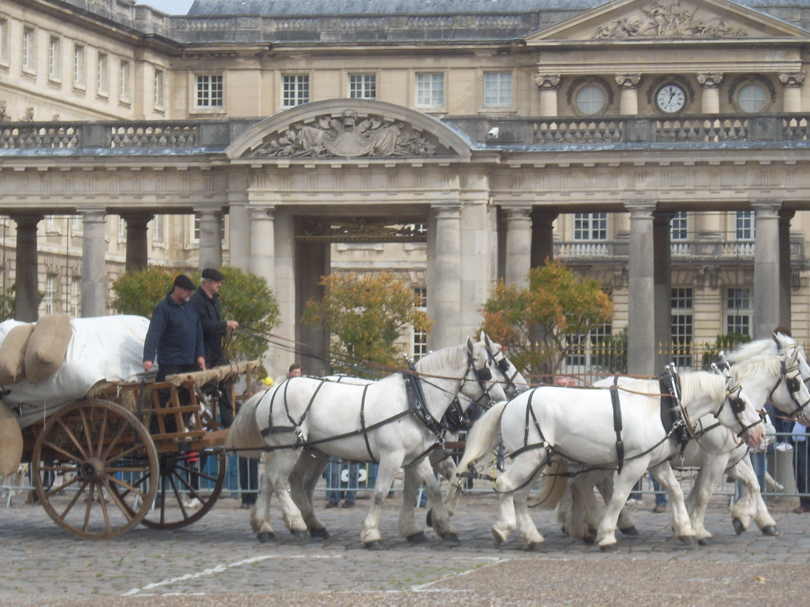 Attelage de mareyeur d'époque sur la route du Poisson 2012, final à Compiègne